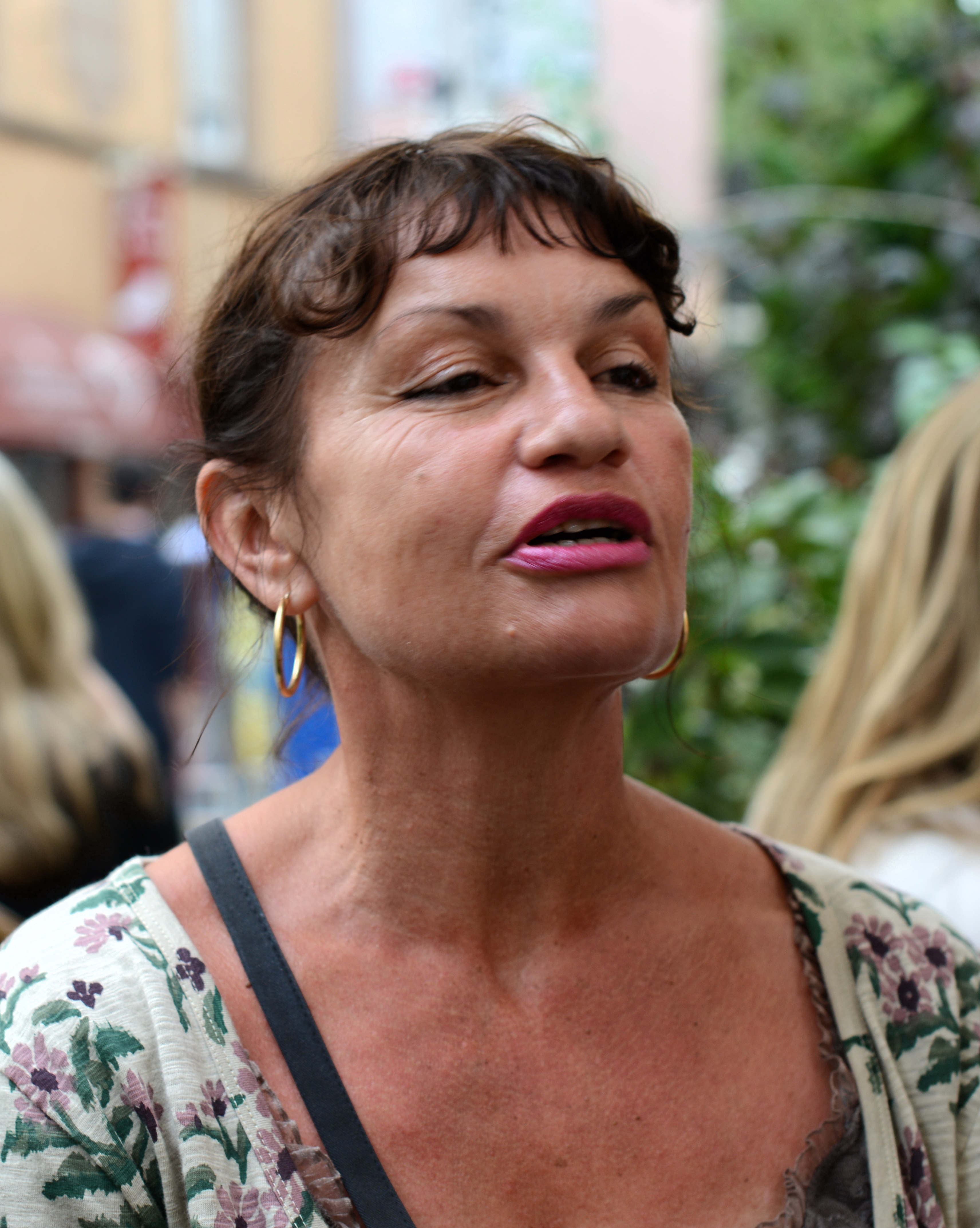 D'Pina Delvaux, Summer 2013.